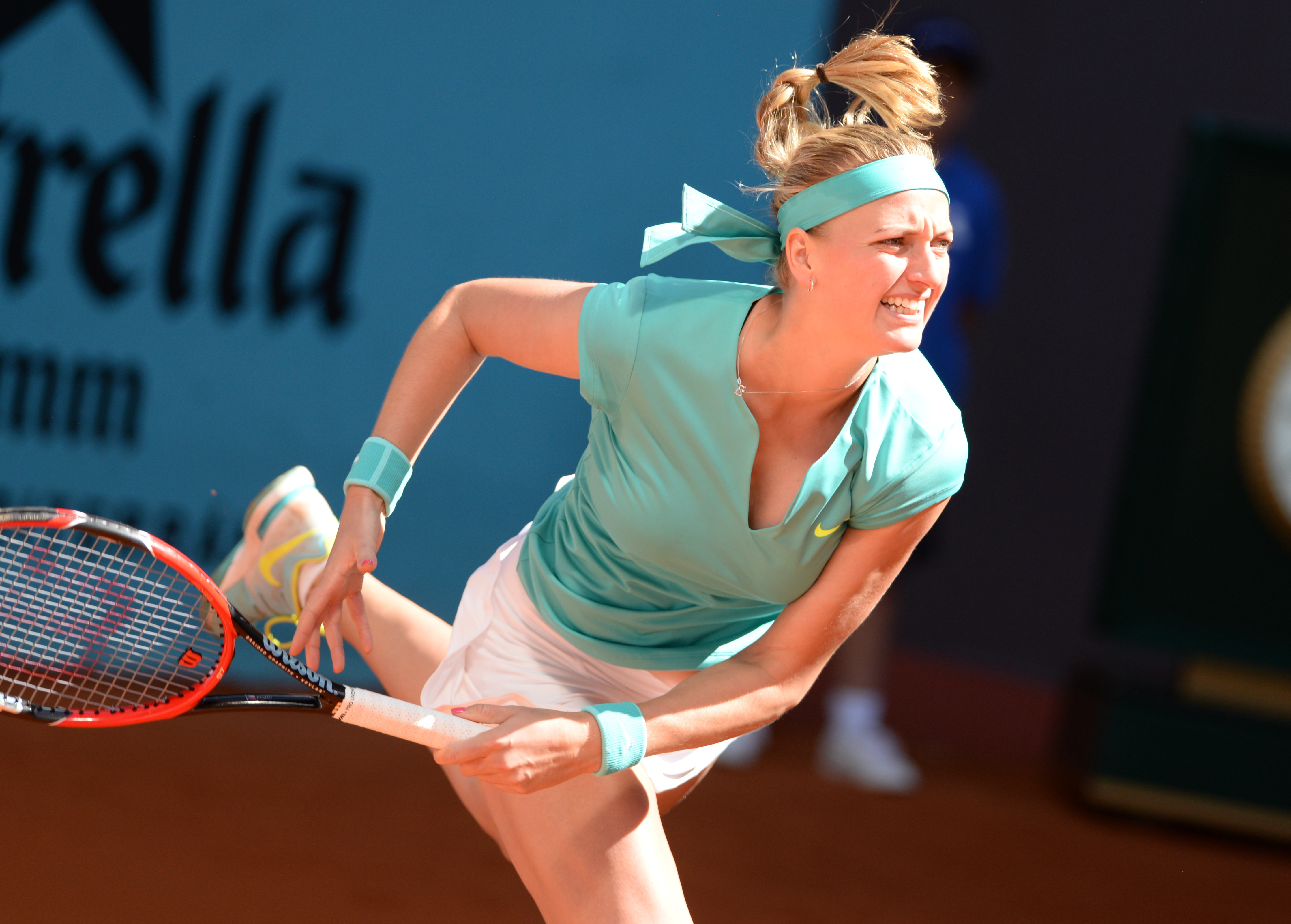 Petra Kvitova